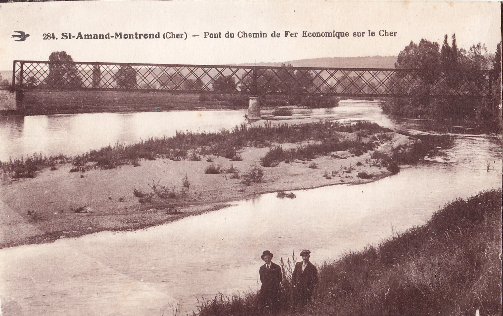 Carte postale ancienne éditée par L'Hirondelle, n°284 : St-AMAND-MONTROND - Pont du Chemin de fer économique sur le Cher